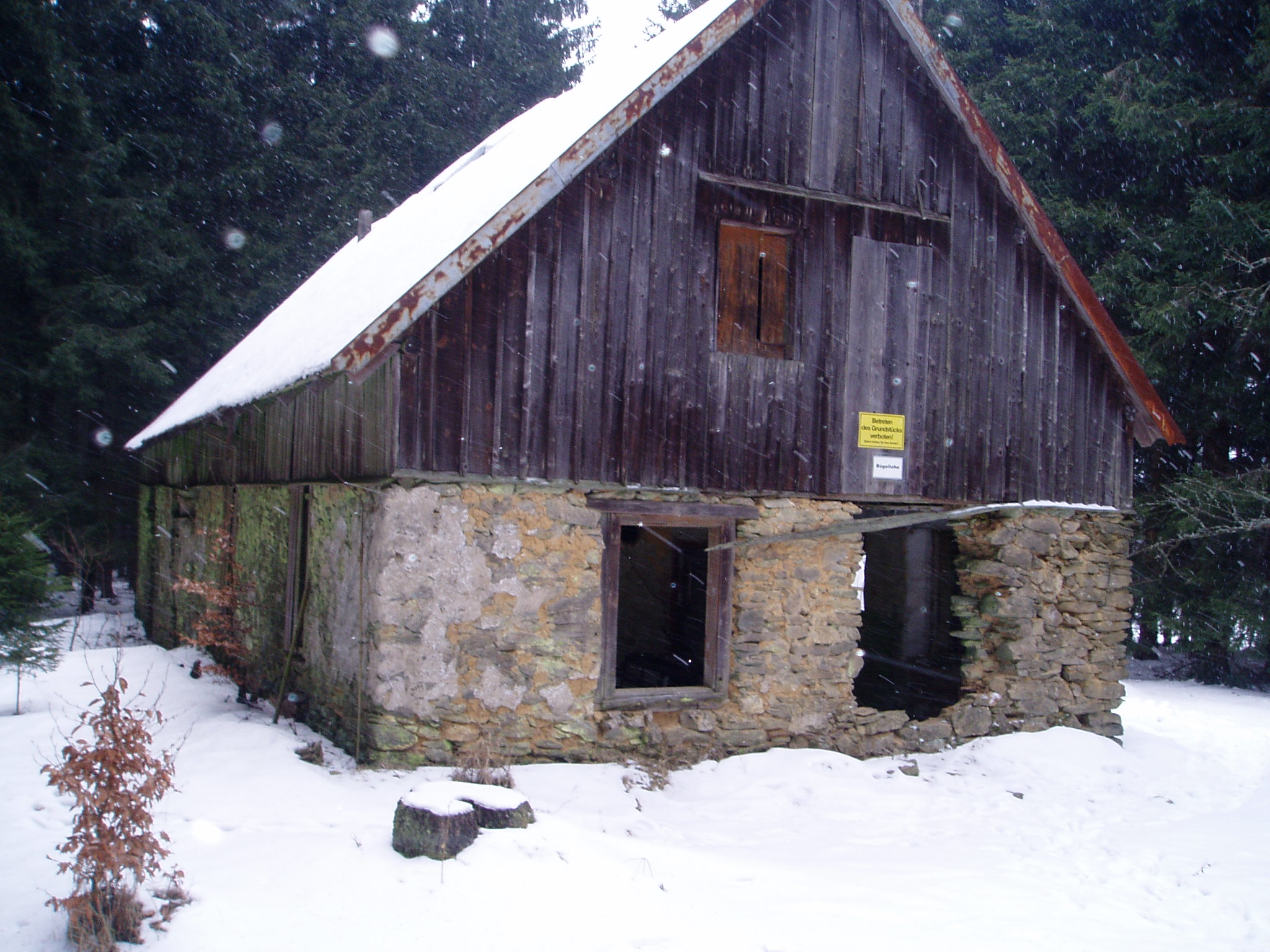 Haus der Familie Lang (Fleischhackerhaus), Bügellohe